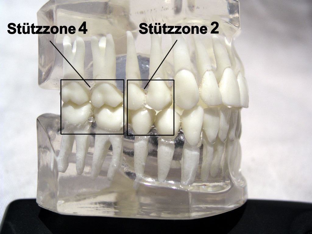 Darstellung von Stützzonen